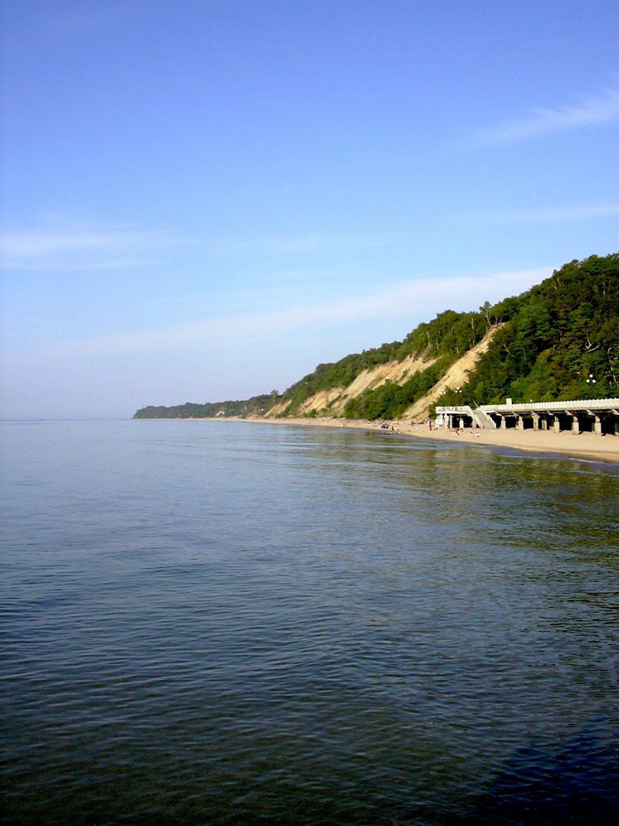 Svetlogorsk beach in June.